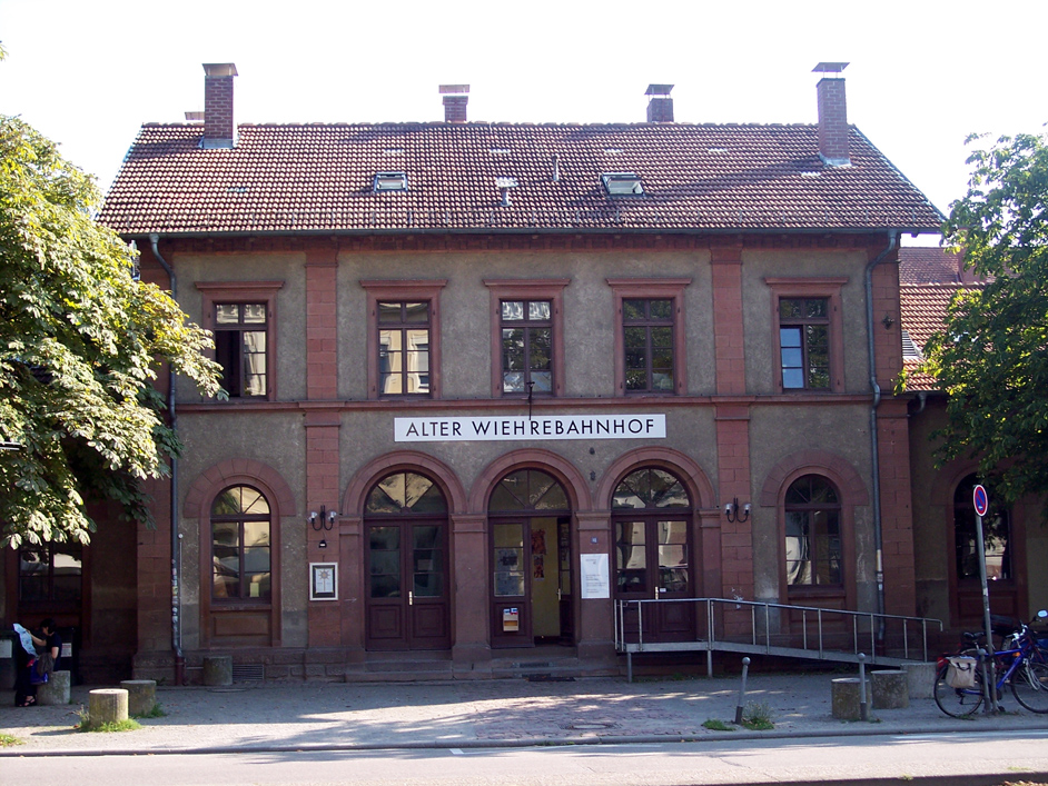 von Autor Chalco am 30. August 2005 fotografiert, Alter Wiehrebahnhof, Stadtteil Wiehre, Freiburg im Breisgau